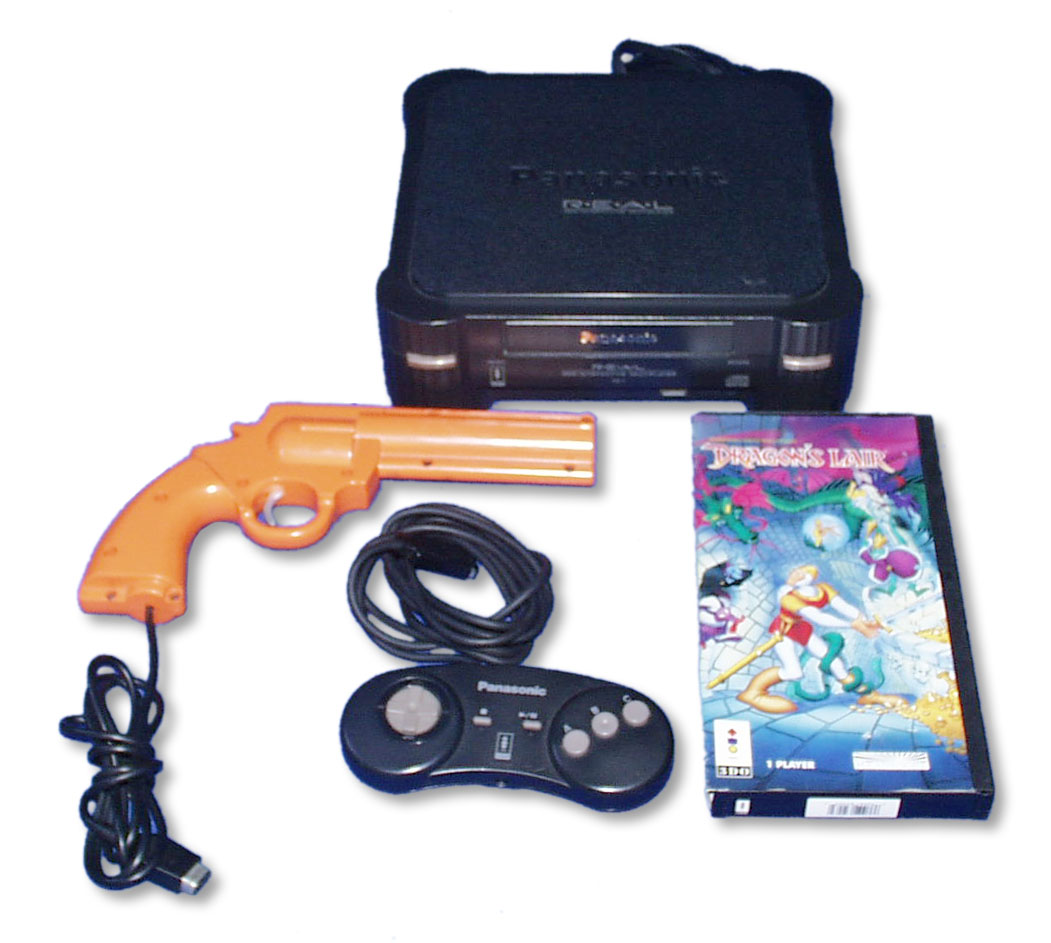 3D0 game console